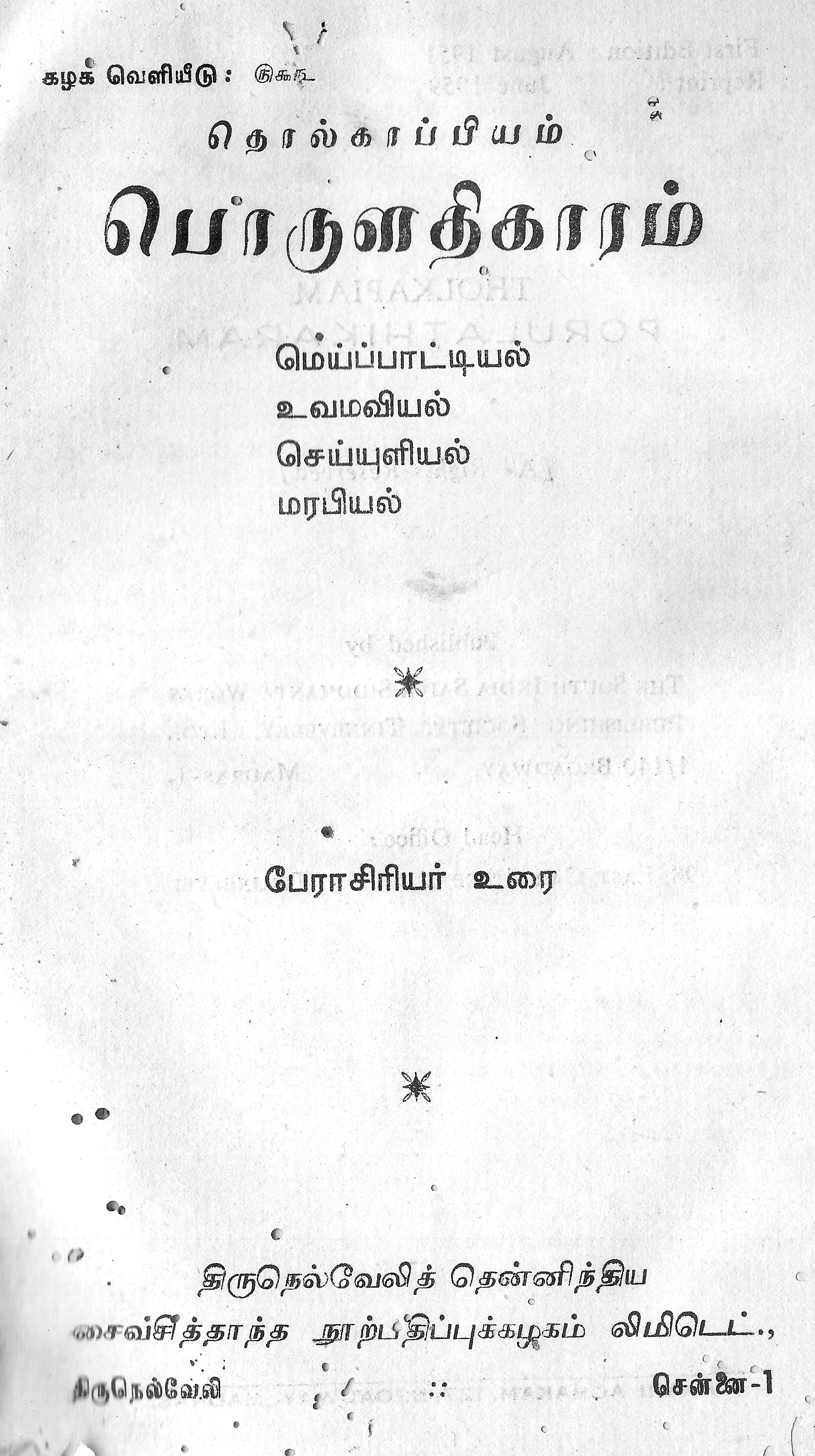 நூல் முதல் பக்கம் தொல்காப்பியம் பொருளதிகாரம் பேராசிரியம்